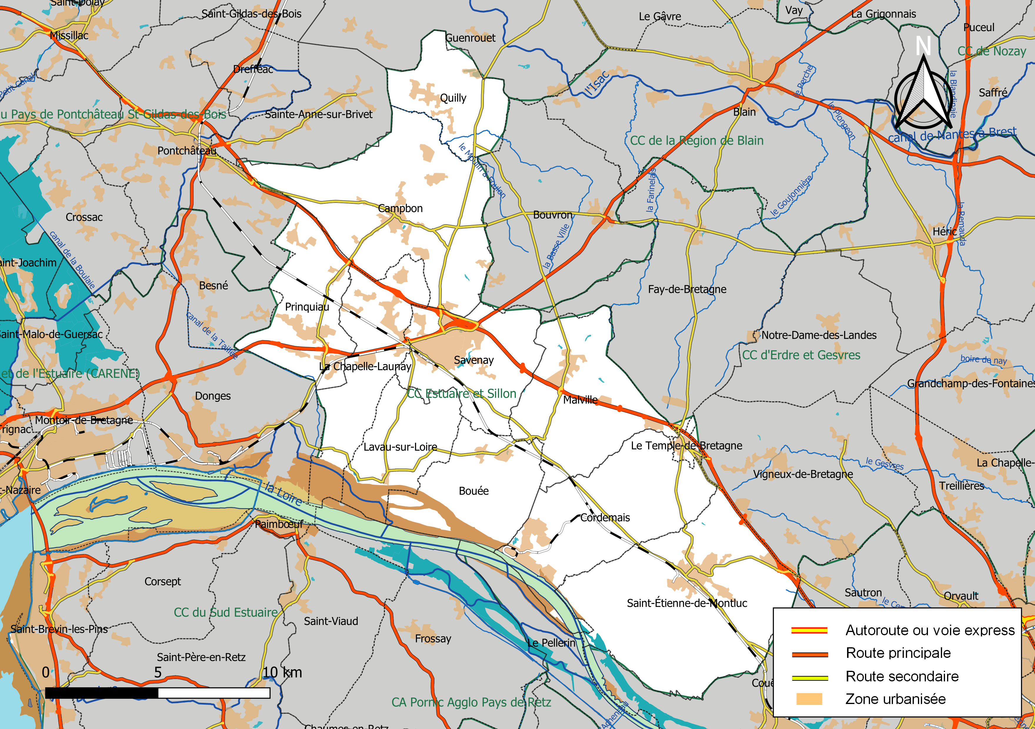 Carte géographique de la Communauté de communes Estuaire et Sillon, département de la Loire-Atlantique, France. Composition au 1er janvier 2019.